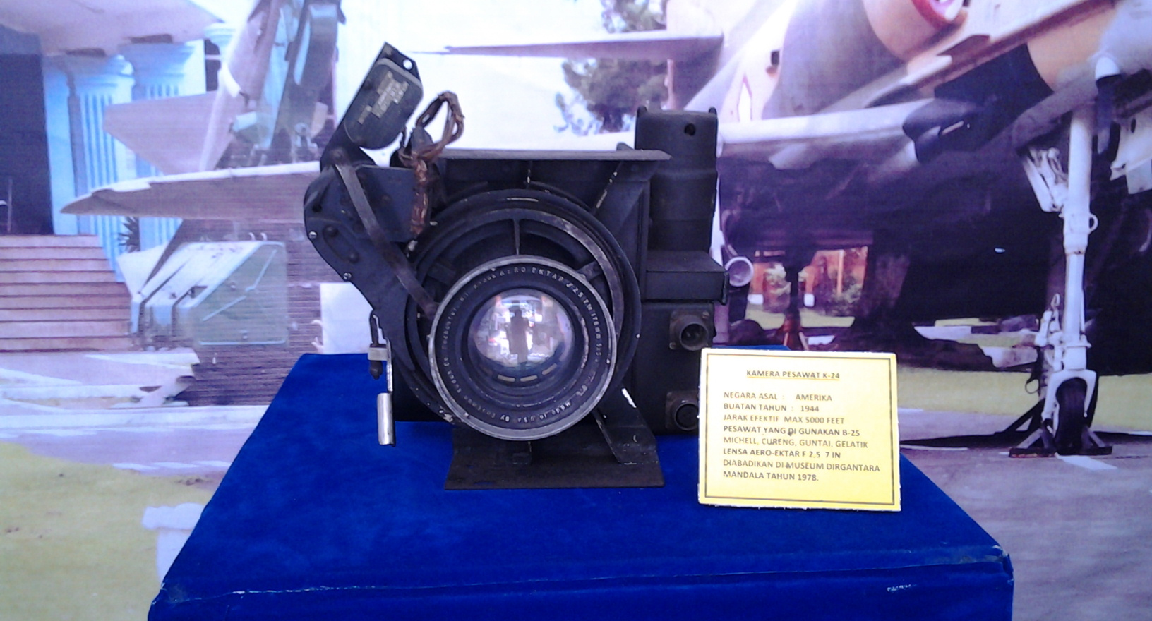 Kamera pesawat K-24 dibuat oleh Amerika tahun 1944. Kamera ini menjadi koleksi Museum Dirgantara Mandala sejak tahun 1978.